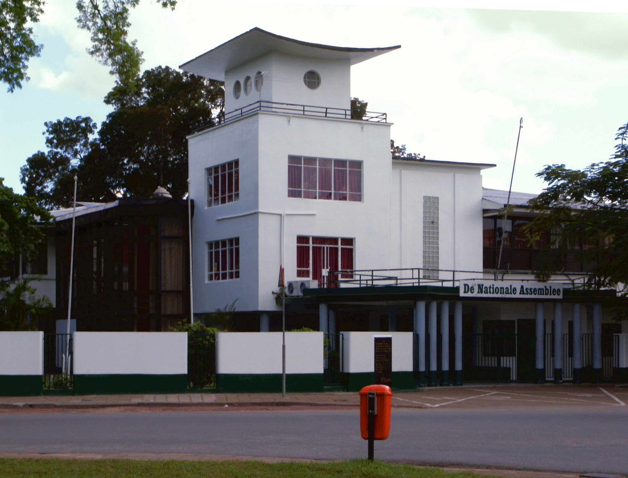 Assemblee in Paramaribo